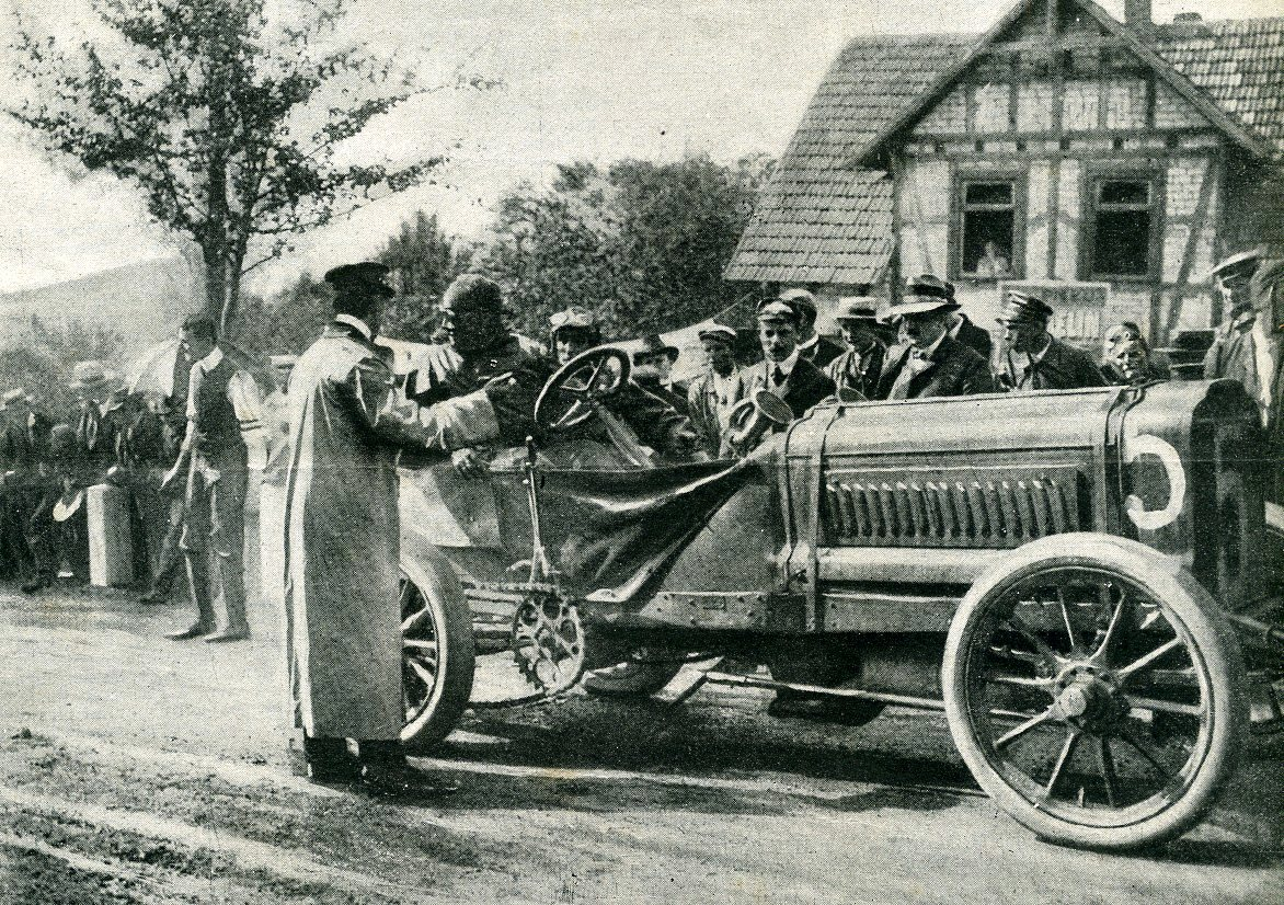 Le vainqueur Théry à Esch Au dernier tour avec une avance de douze minutes La coupe Gordon-Bennett